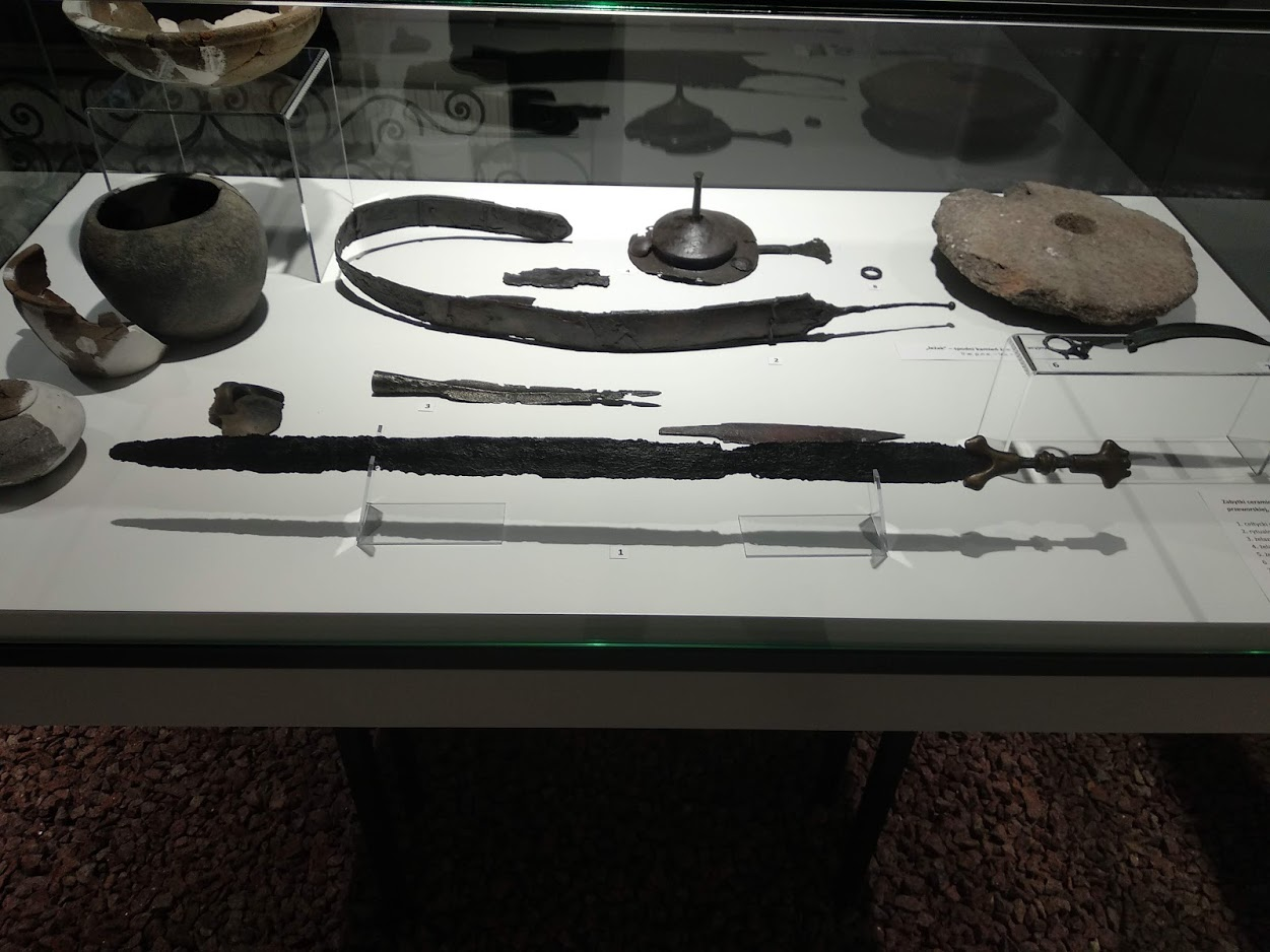 Muzeum Historii Włocławka (2019 r.)